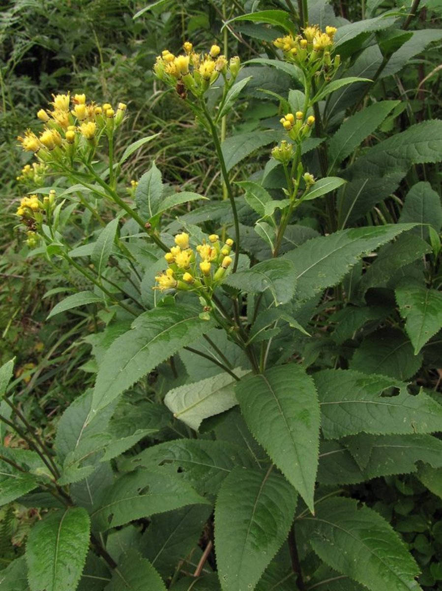 Cevastocvetni grint na Komnu.